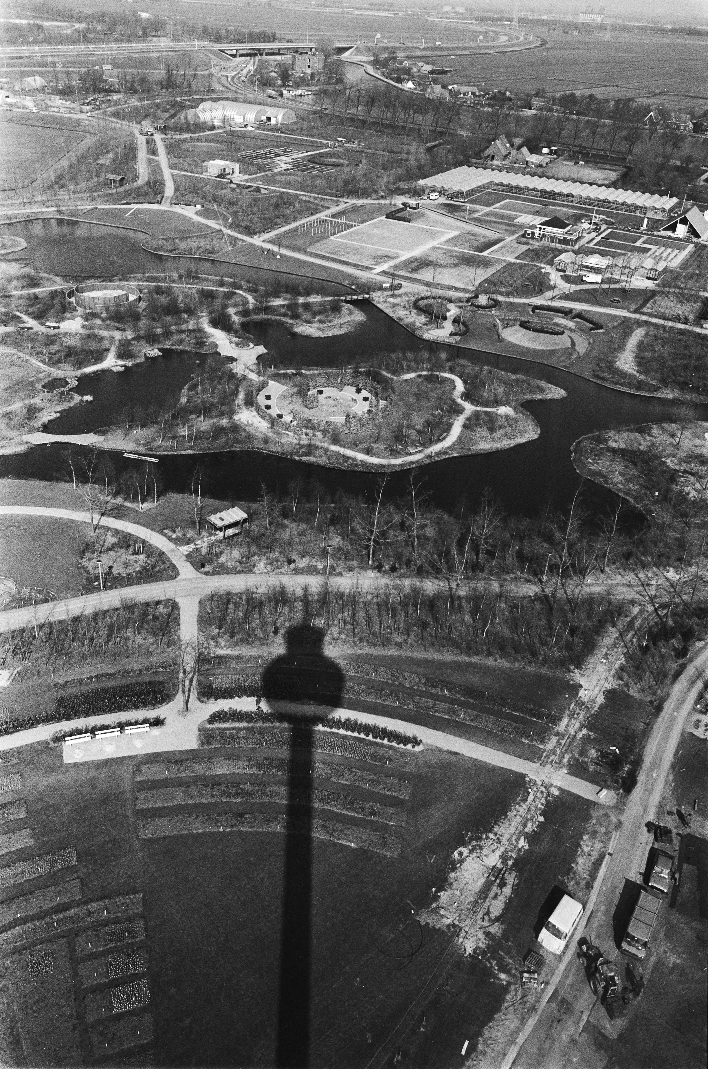 Collectie / Archief : Fotocollectie Anefo Reportage / Serie : [ onbekend ] Beschrijving : Pers bezichtiging in Floriade. Uitzichten vanuit de uitkijktoren Datum : 31 maart 1982 Trefwoorden : tentoonstellingen Instellingsnaam : Floriade Fotograaf : Bogaerts, Rob / Anefo Auteursrechthebbende : Nationaal Archief Materiaalsoort : Negatief (zwart/wit) Nummer archiefinventaris : bekijk toegang 2.24.01.05 Bestanddeelnummer : 932-0819